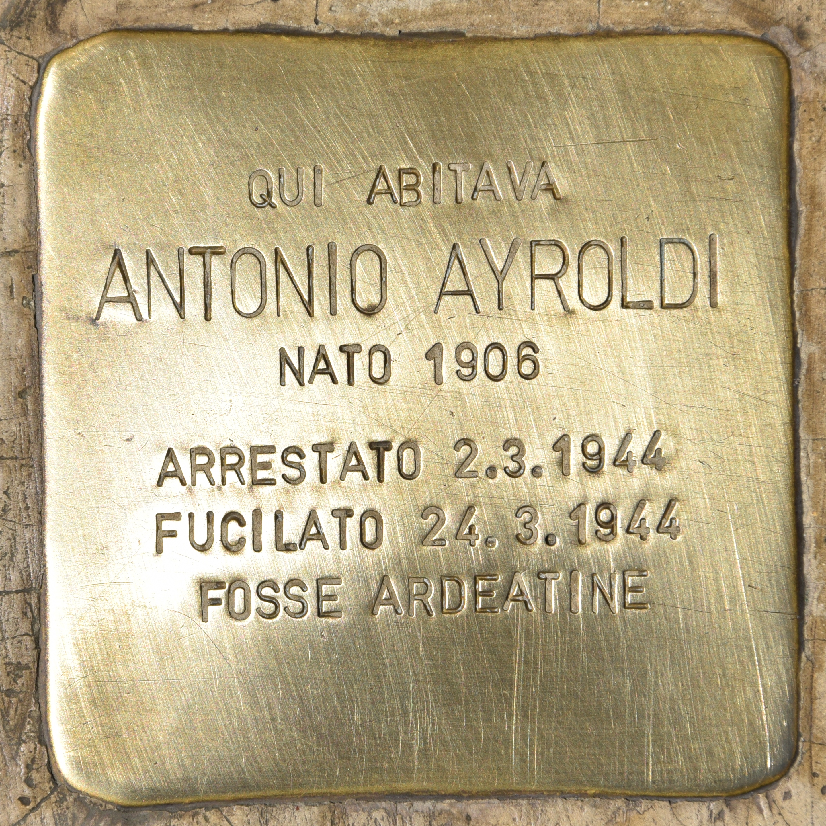 Stolperstein für Antonio Ayroldi